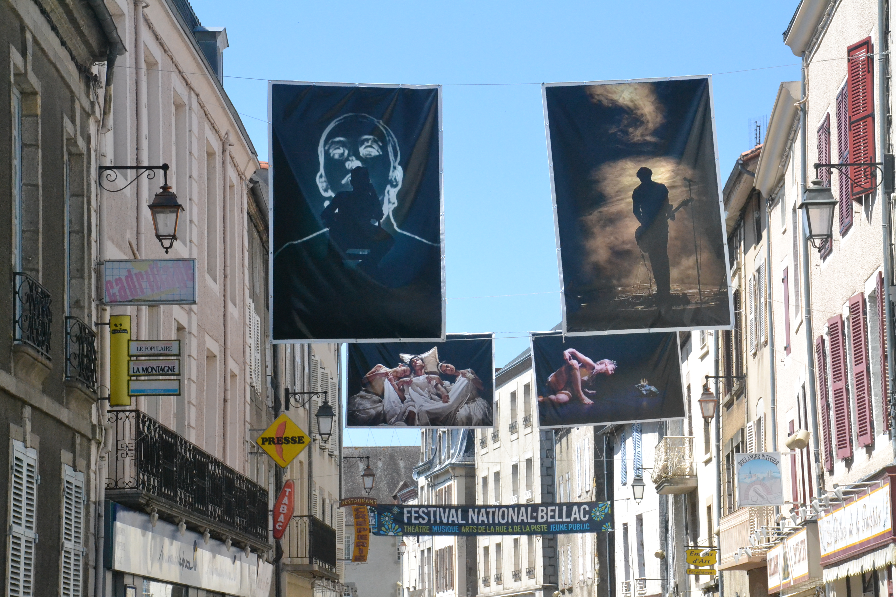 Photos et banderoles du festival national de Bellac (Haute-Vienne, France)